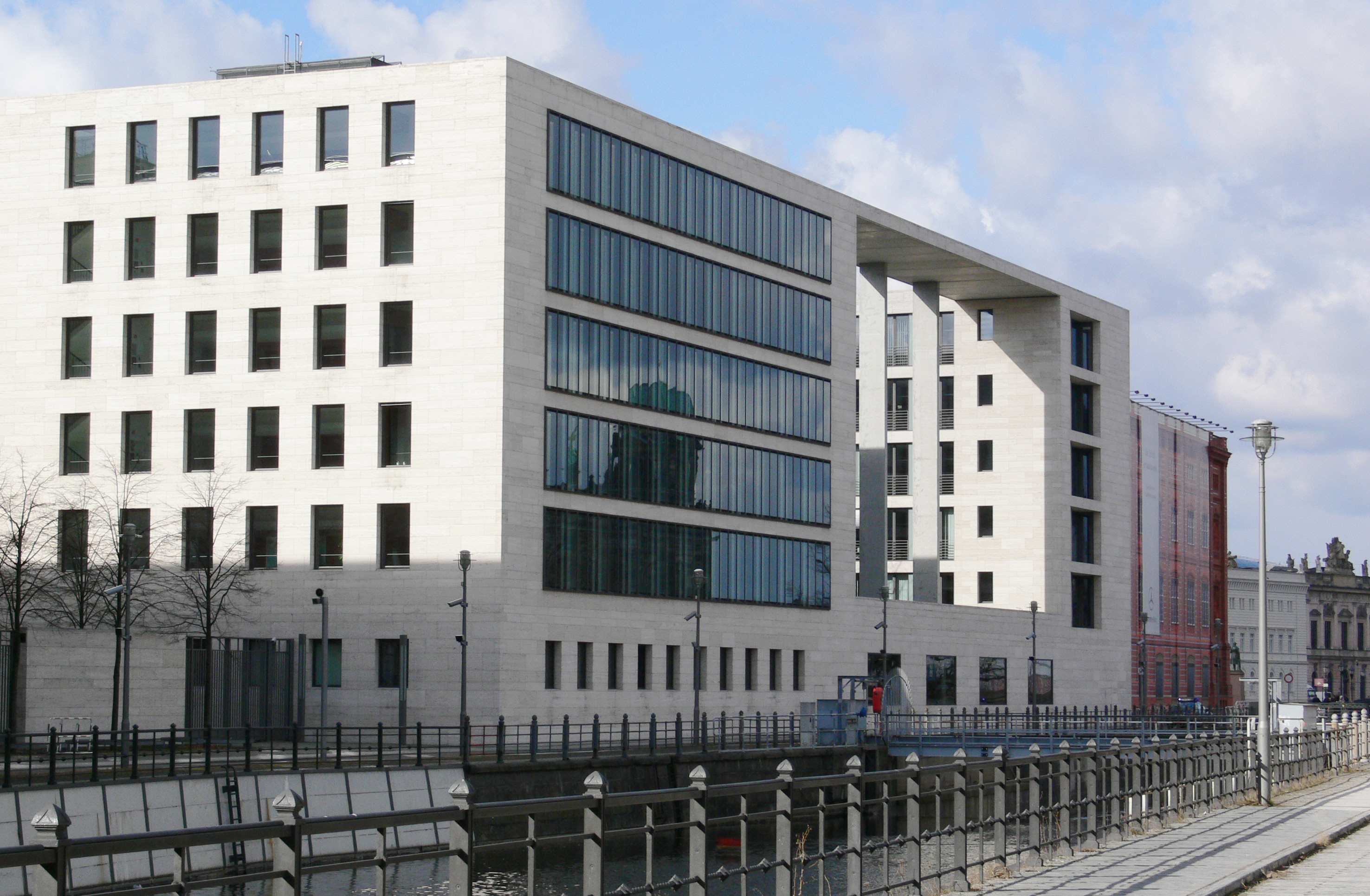 Auswärtiges Amt, Neubau, Berlin (Blick von der Friedrichsgracht)